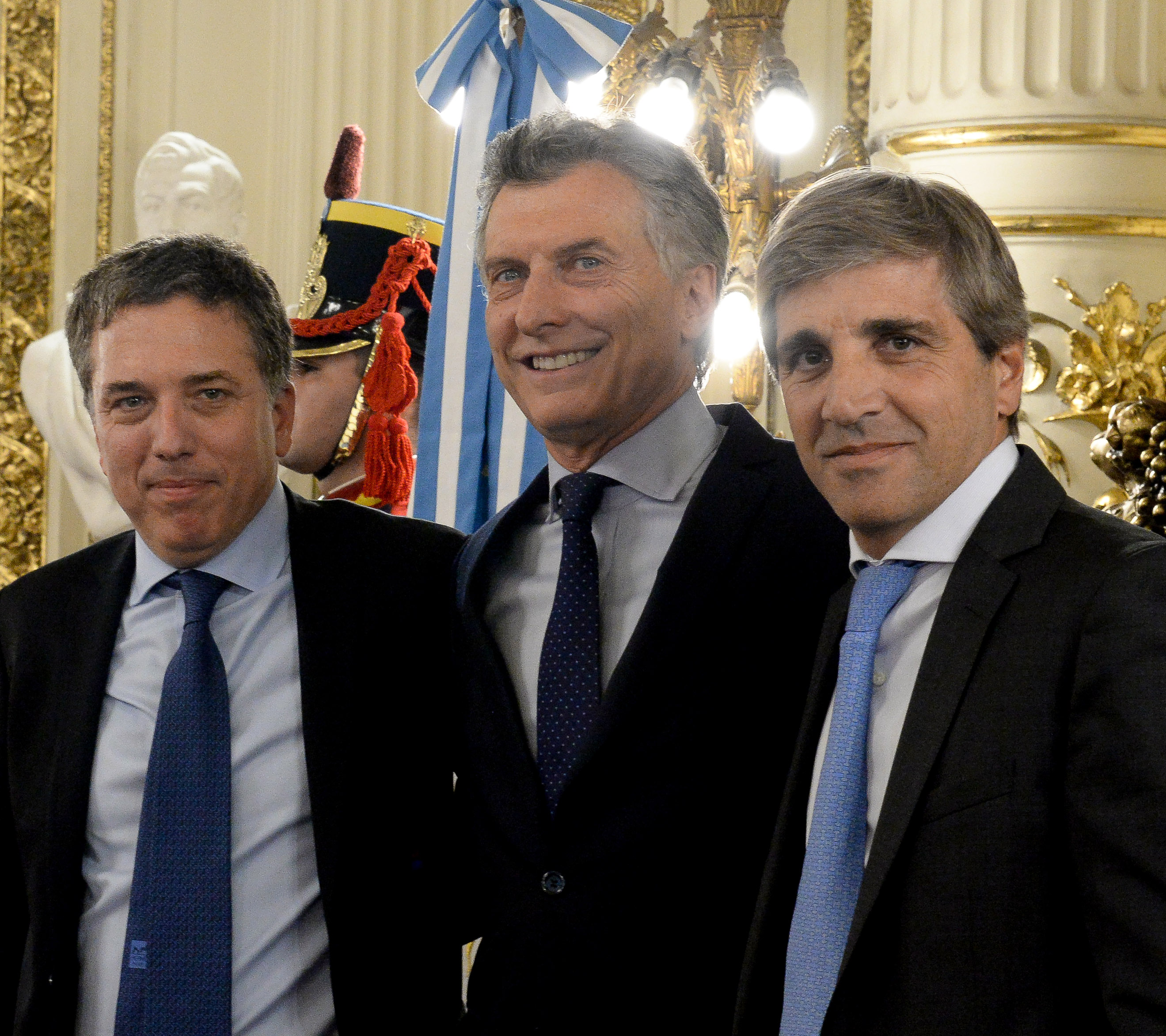 El presidente Mauricio Macri tomó juramento a los ministros de Hacienda, Nicolás Dujovne, y de Finanzas, Luis Caputo, en una ceremonia realizada en el Salón Blanco de la Casa de Gobierno.